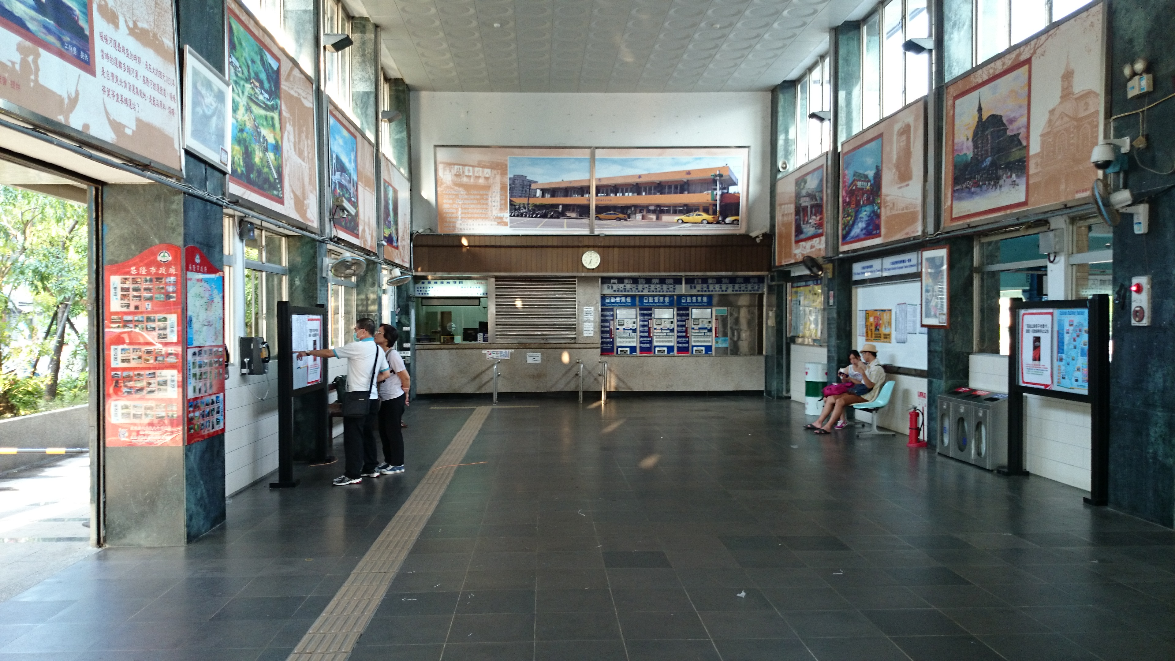 臺灣鐵路管理局八堵車站大廳售票口。